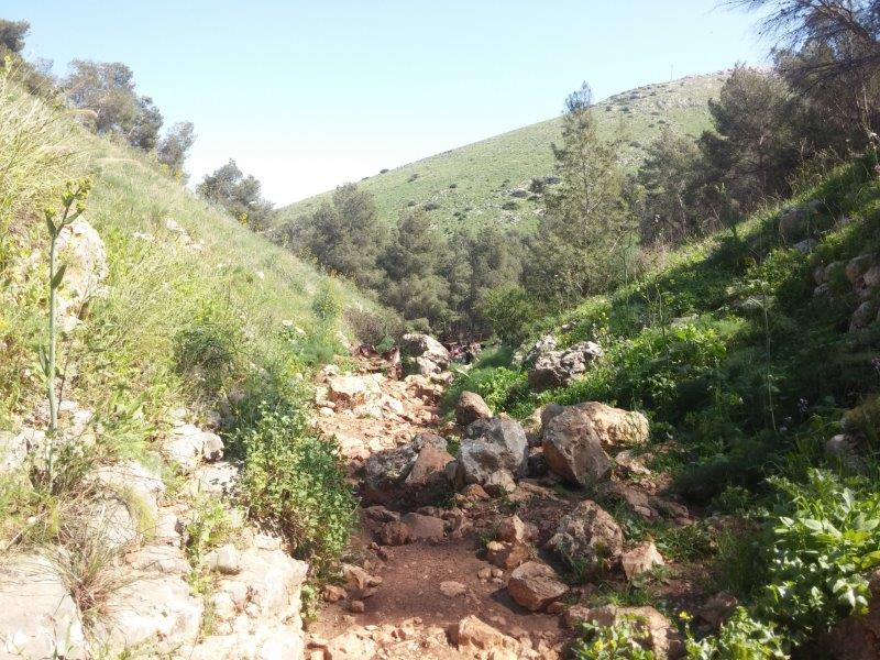 ערוץ נחל יצפור, גלבוע, Itzpor Valley, Gilboa, Israel